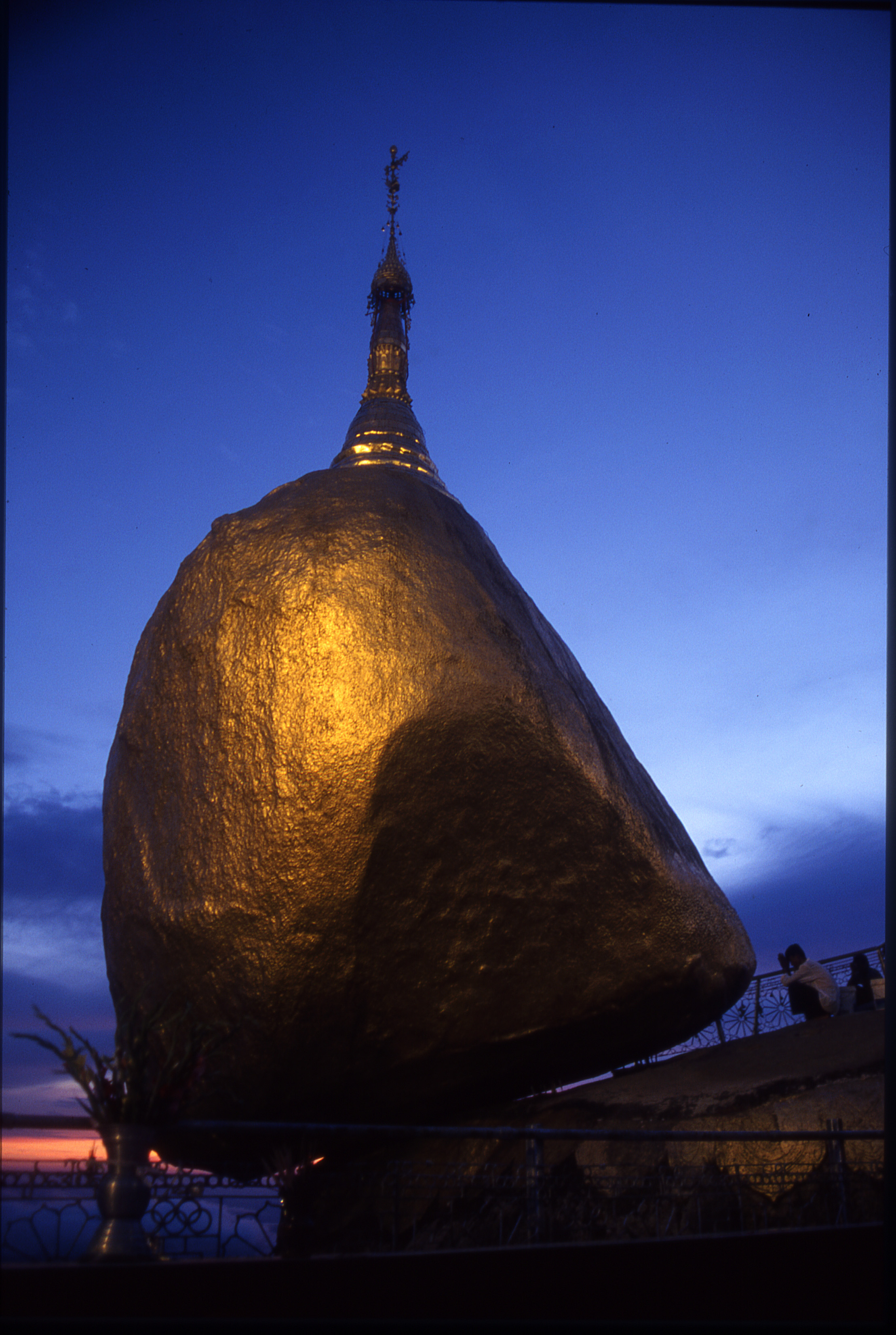 Birmanie, rocher d'or à la tombée de la nuit